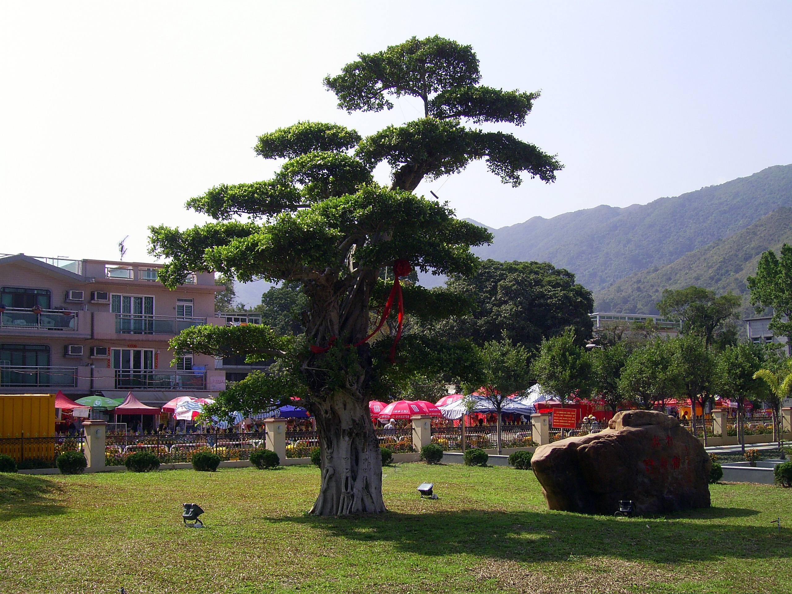 中文（香港）: 林村「新」許願樹